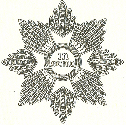 Ster van de Orde van de Fenix Hohenlohe uitgave uit 1893